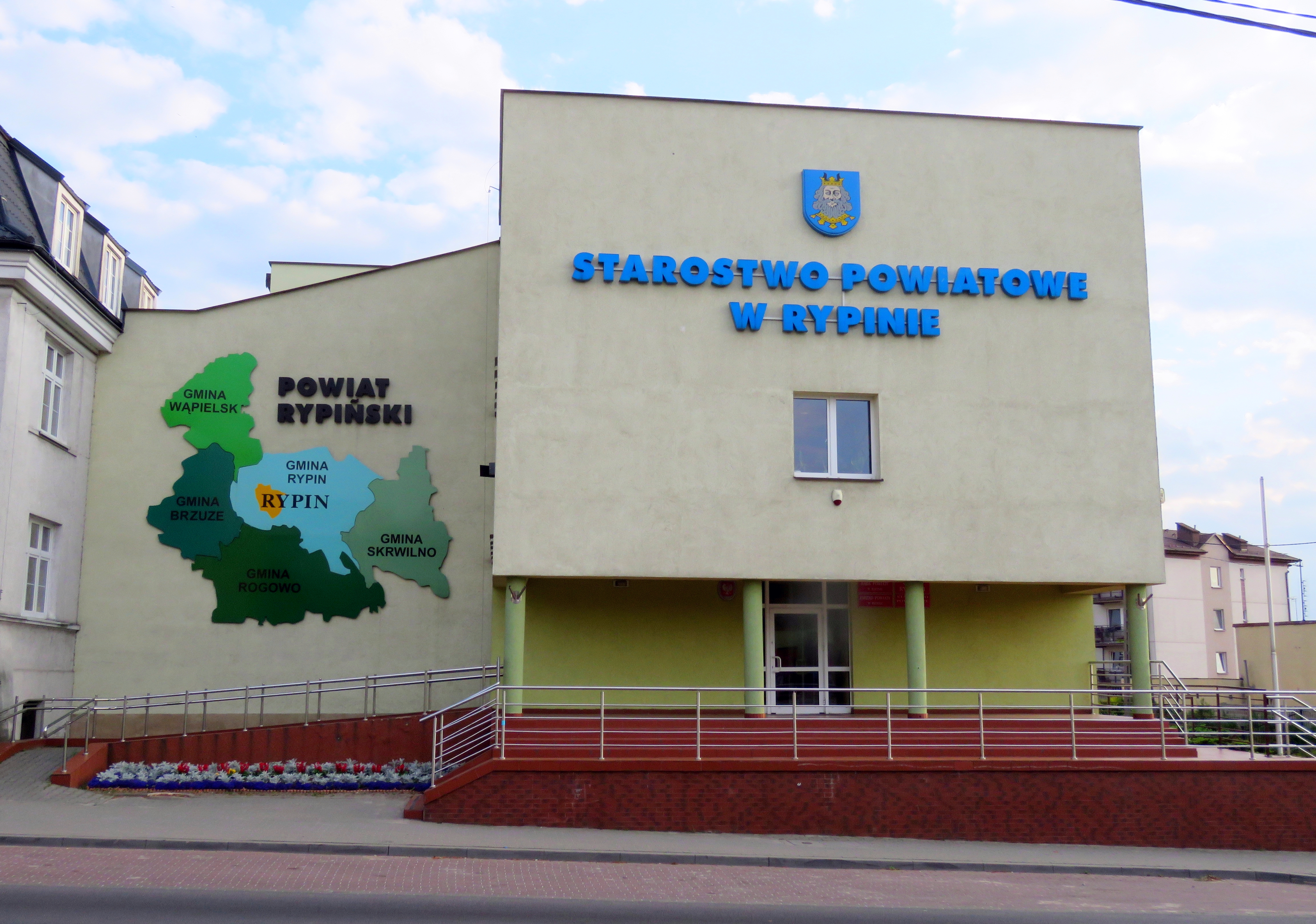 Starostwo Powiatowe